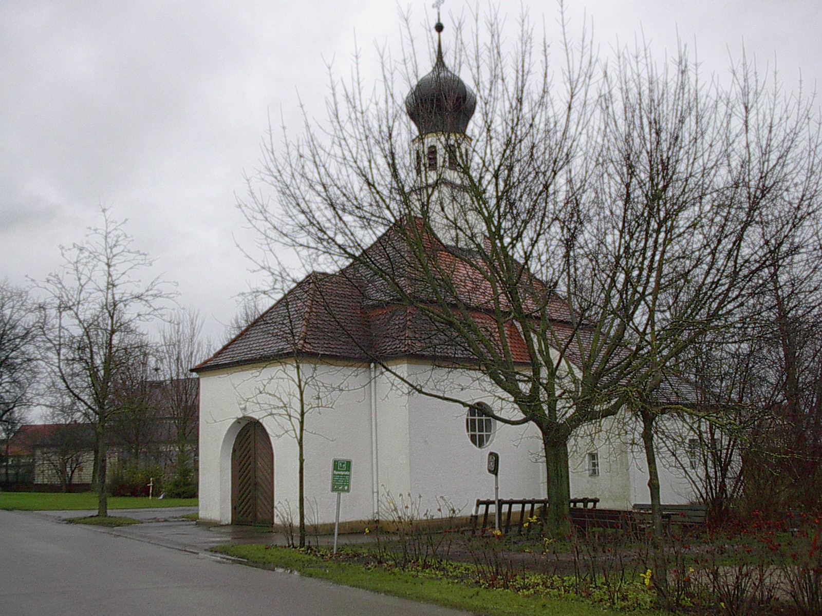 Kapelle Bruck als Dorfsymbol